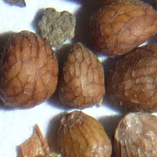 Licania rigida Samen